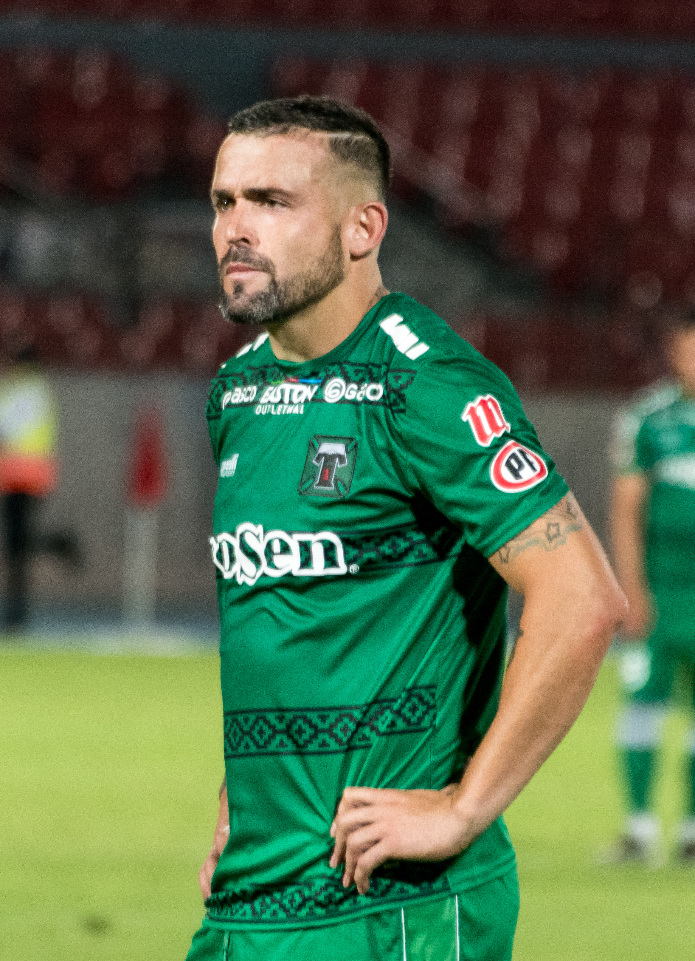 Deportes La Serena v Deportes Temuco, Estadio Nacional de Chile, Ñuñoa, Santiago, Región Metropolitana, Chile